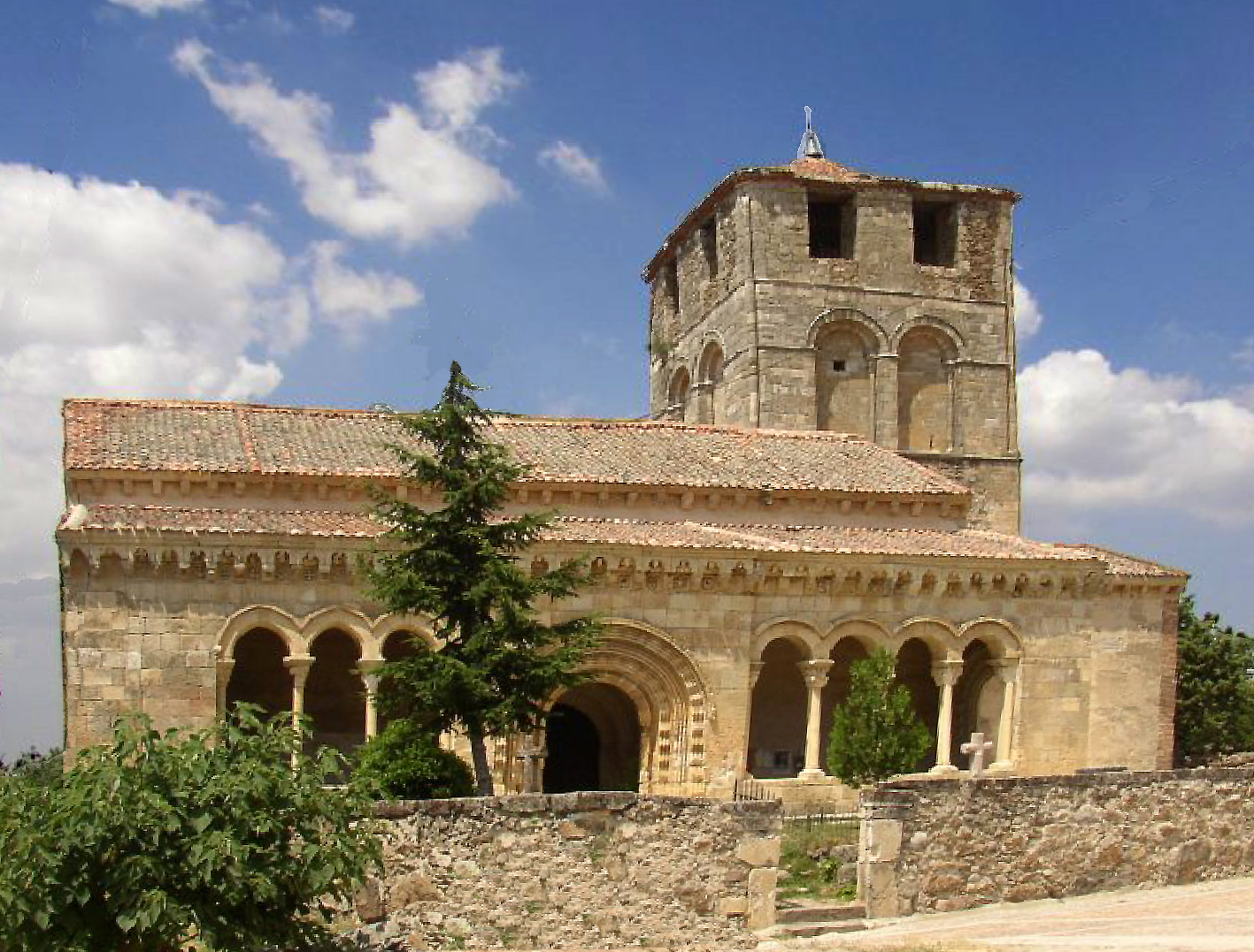 Segovia. (Castilla-León. España) Sotosalbos. Iglesia románica. Fotografía realizada el 22 julio de 2003 por el autor.User:Pelayo2.